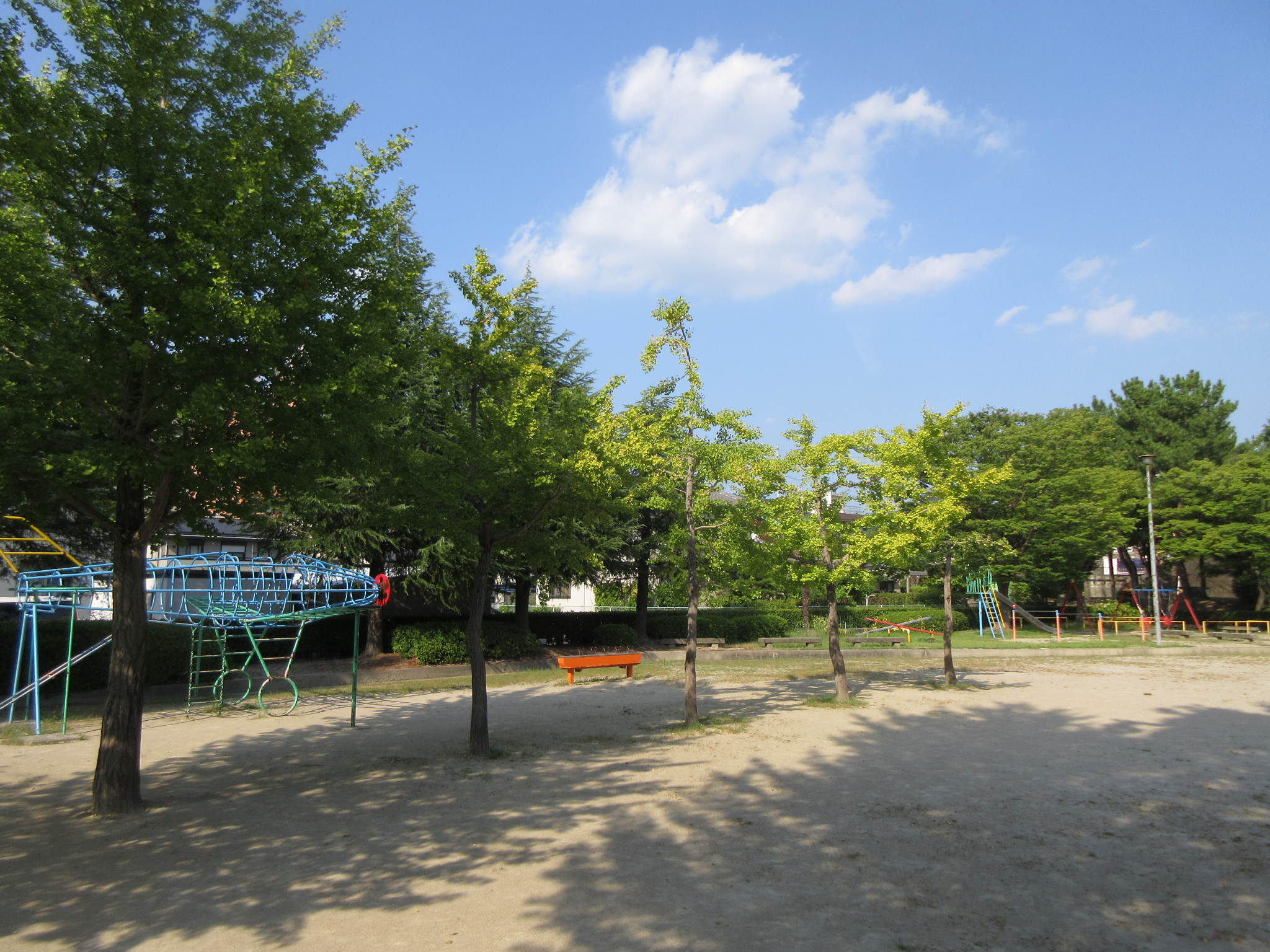 元能見公園（岡崎市城北町）